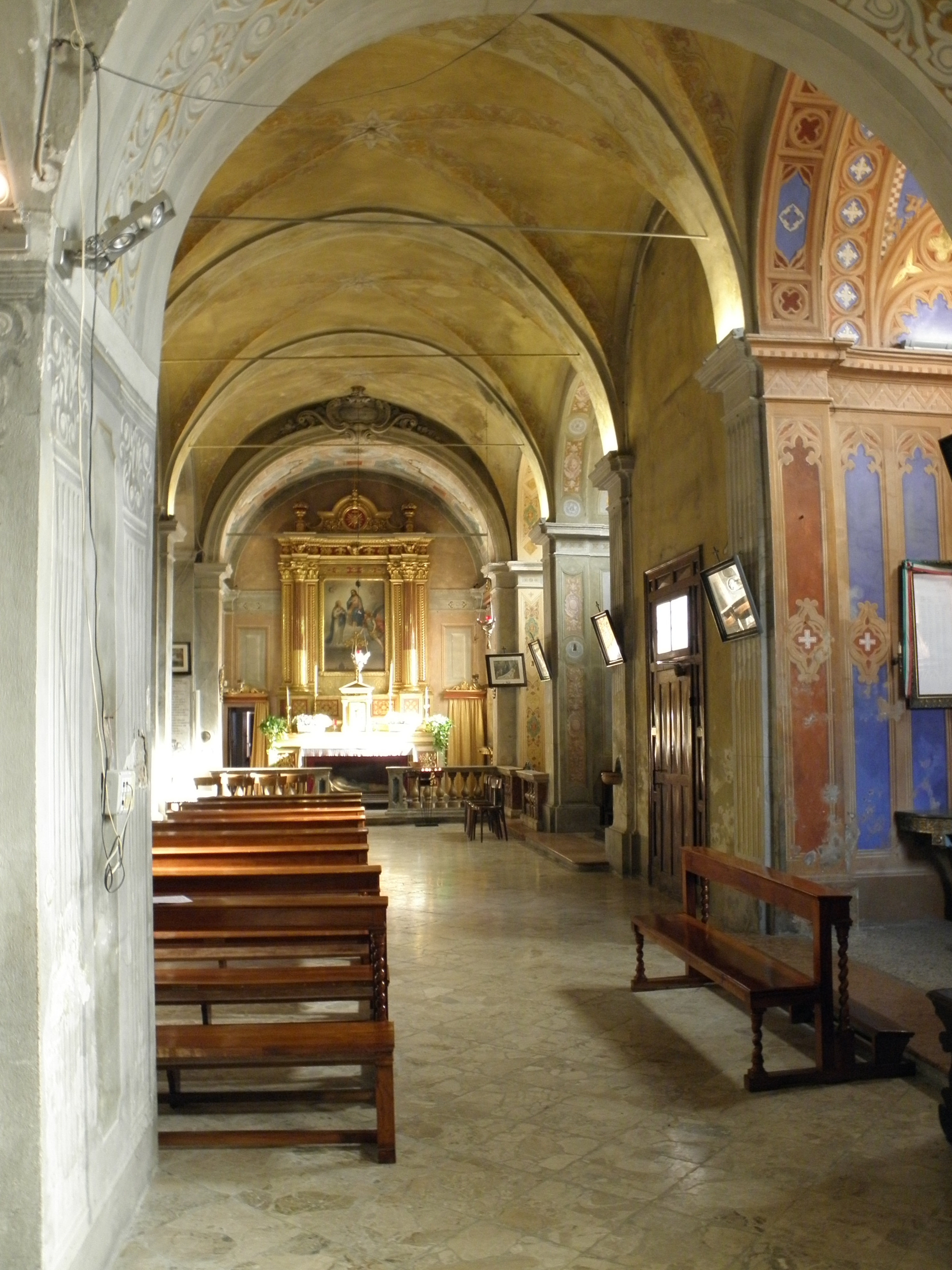 Sissa, già comune autonomo, frazione di Sissa Trecasali: chiesa parrocchiale di Santa Maria Assunta, interno.